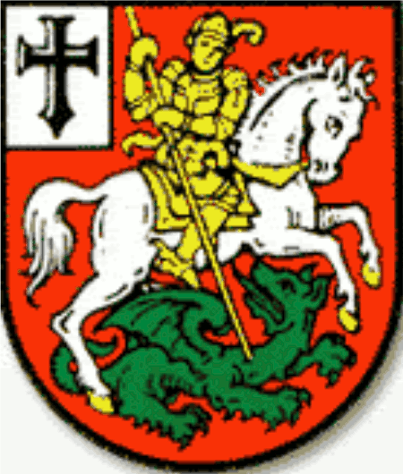 Coat of arms Samtgemeinde Sottrum, Wappen der Samtgemeinde Sottrum